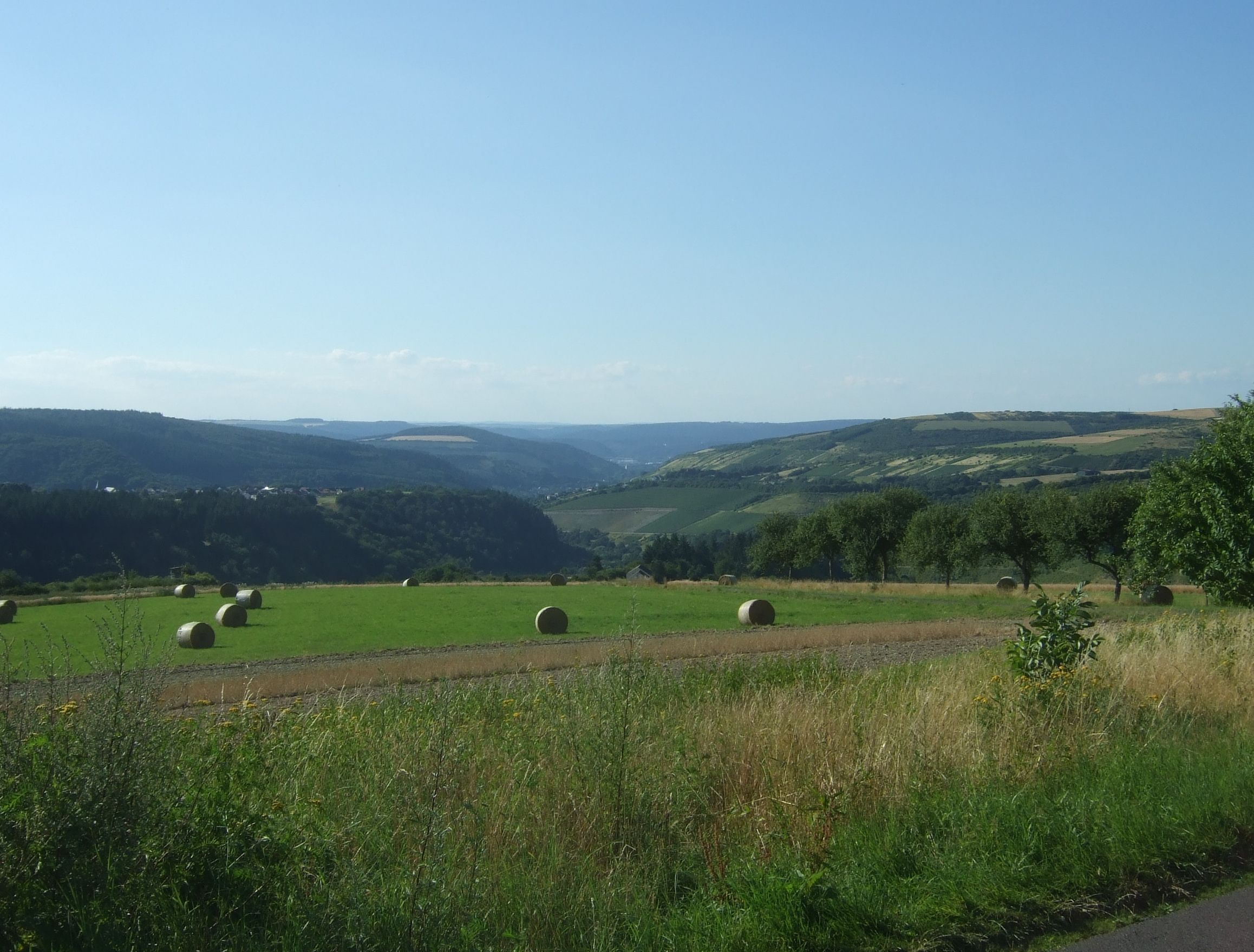 Ruwertal von Osburg aus gesehen